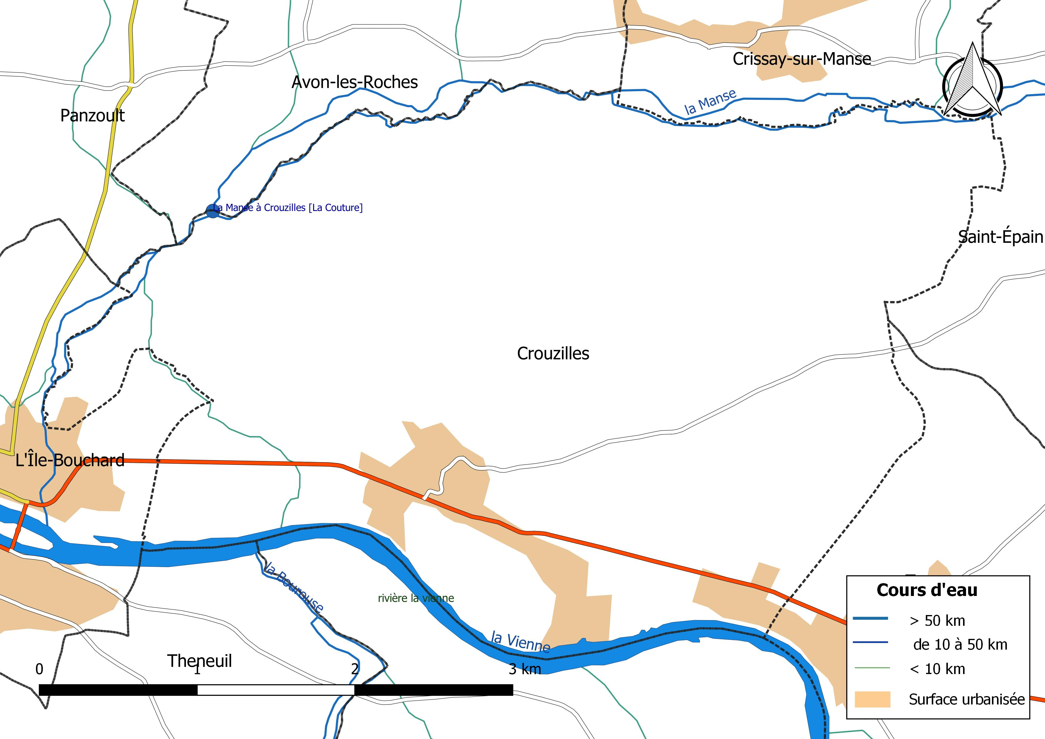 Carte du réseau hydrographique de la commune de Crouzilles (France).